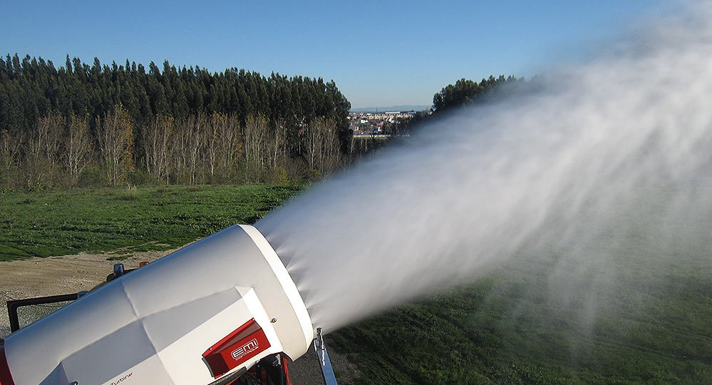 Eine Brandbekämpfungsturbine von EmiControls im Einsatz